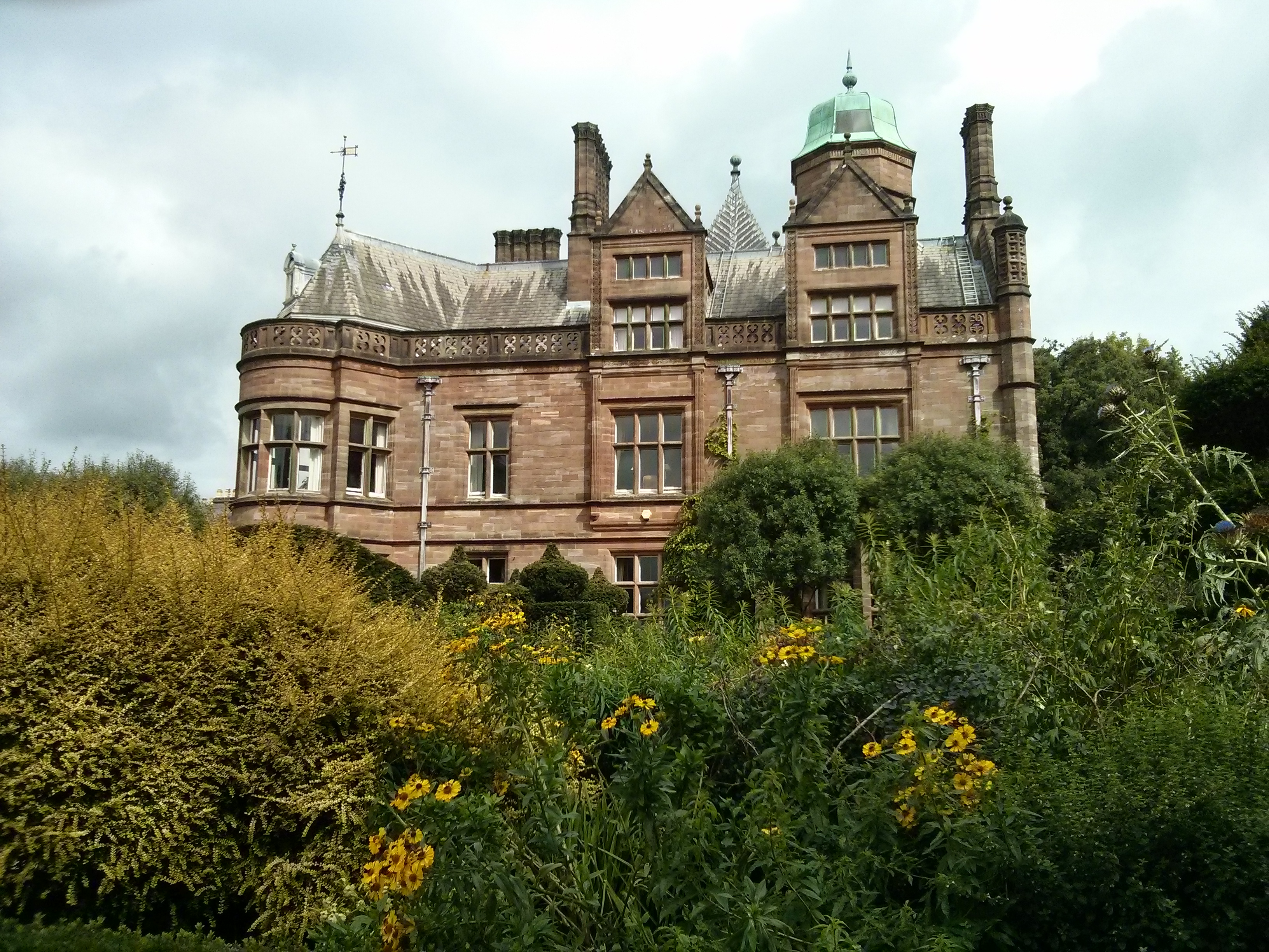 Volker Hall side Cark